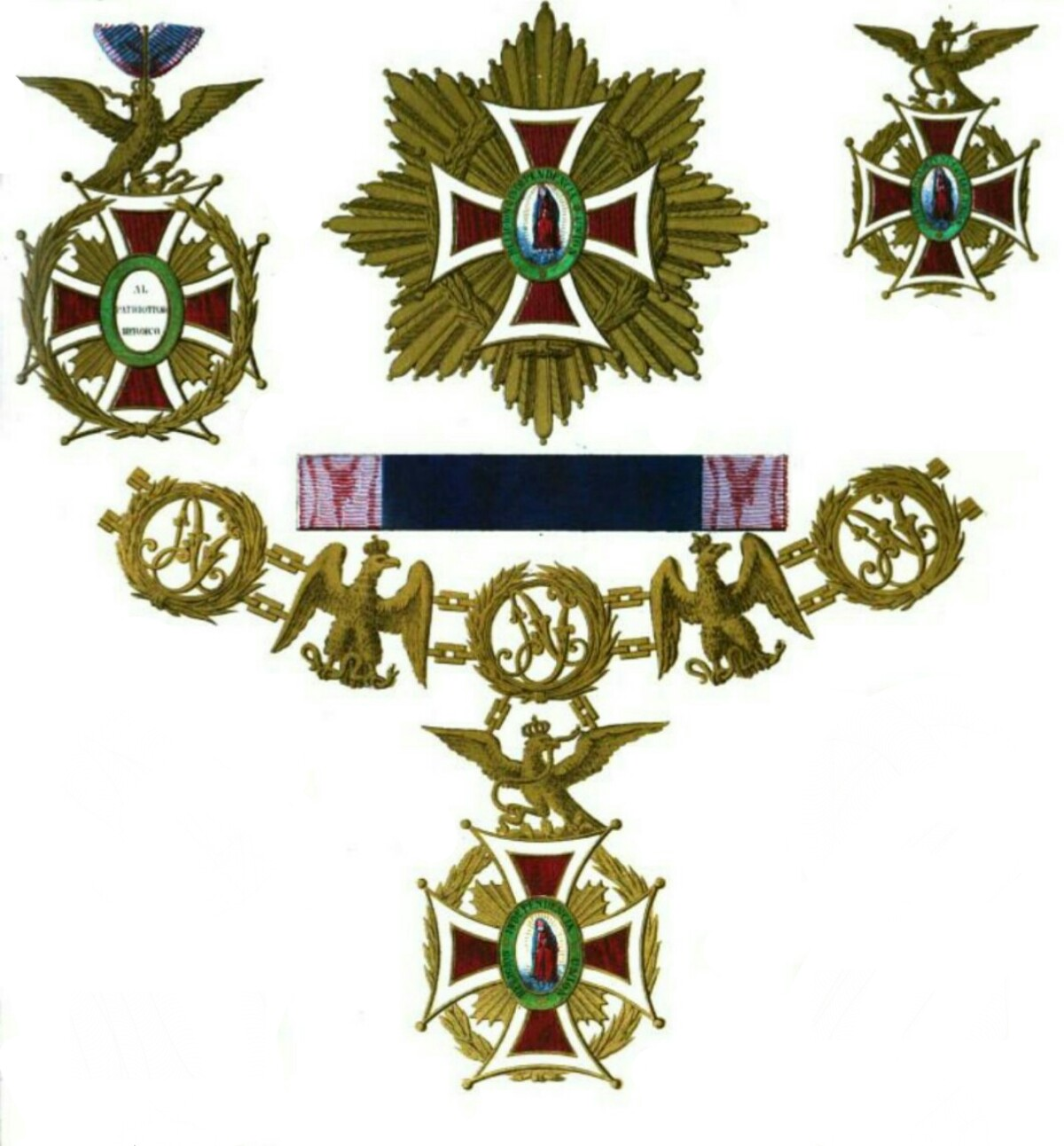 Order Najświętszej Maryi Panny z Guadalupe